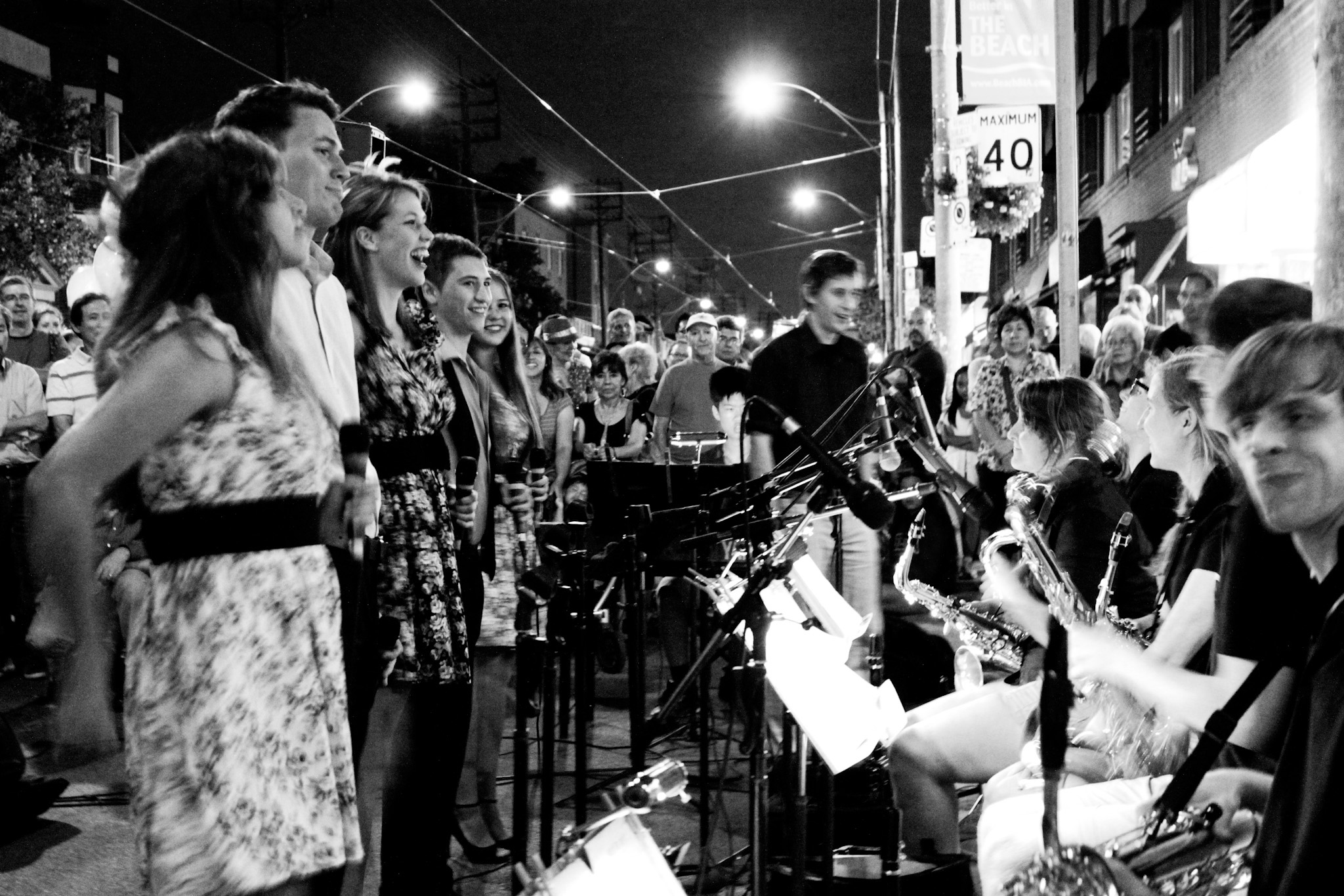 Beaches Jazz 2012. StreetFest.